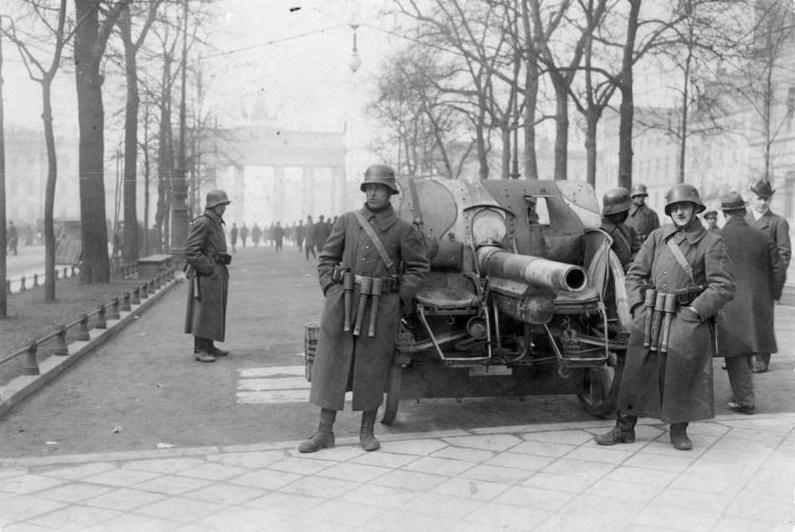 ADN-ZB/Archiv Konterrevolutionärer Kapp-Putsch vom 13.-17.3.1920 in Berlin. - Die etwa 5000 Mann starke Marinebrigade II unter dem Befehl von Kapitän Hermann Ehrhardt marschiert, aus Döberitz kommend, in den frühen Morgenstunden des 13. März in Berlin ein. Die Brigade bildet die militärische Stoßfront des von Wolfgang Kapp und General von Lüttwitz geführten Putsches. Geschütz der Brigade Ehrhardt, Unter den Linden, am Pariser Platz (2835-20)